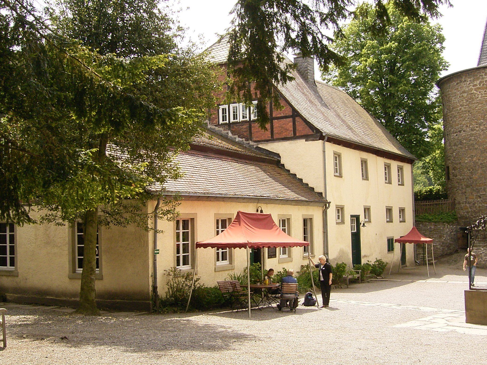 Deutsches Kaltwalzmuseum im Schloss Hohenlimburg in Hagen-Hohenlimburg